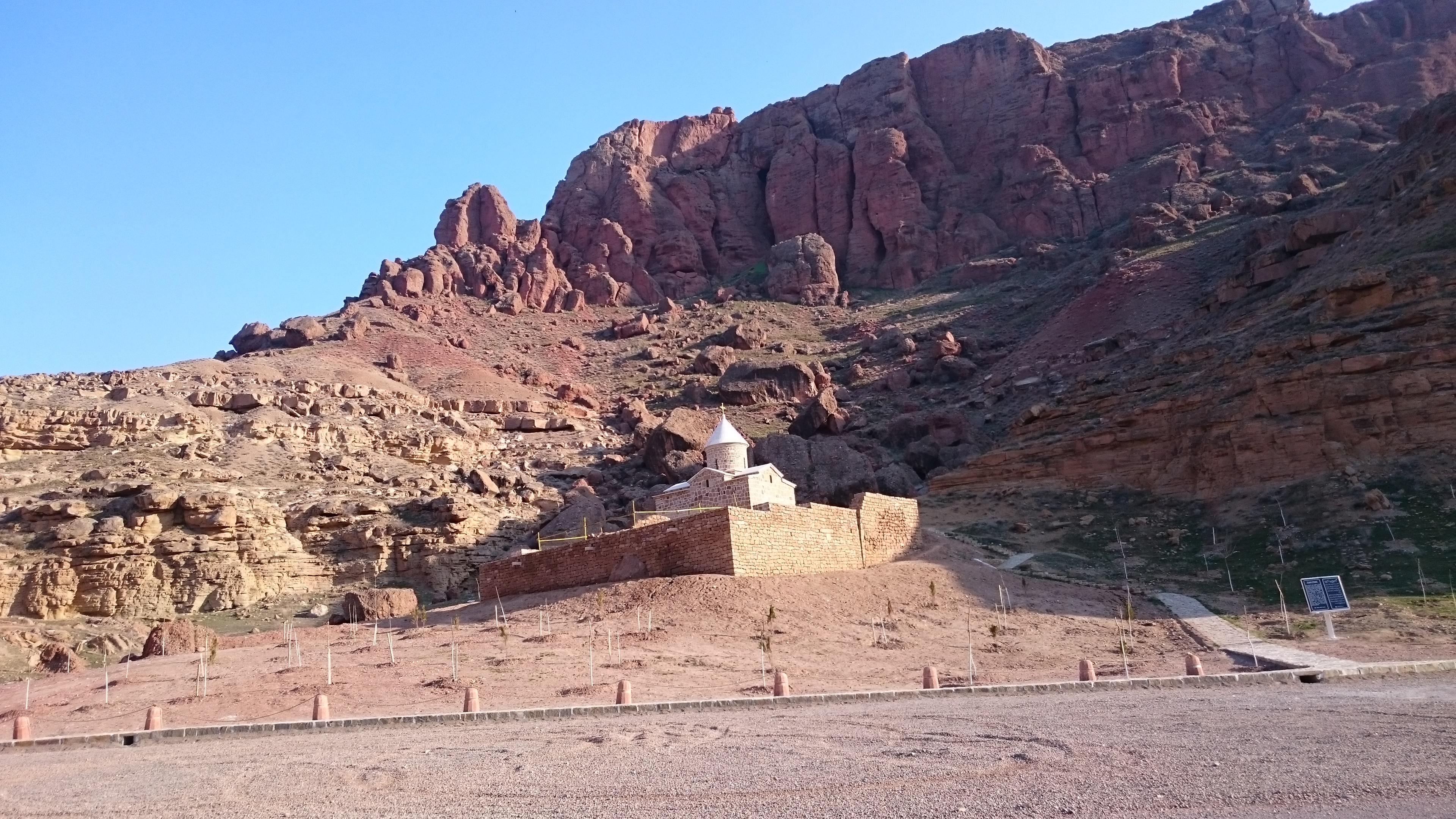 کلیسای چوپان، جلفا، ایران.